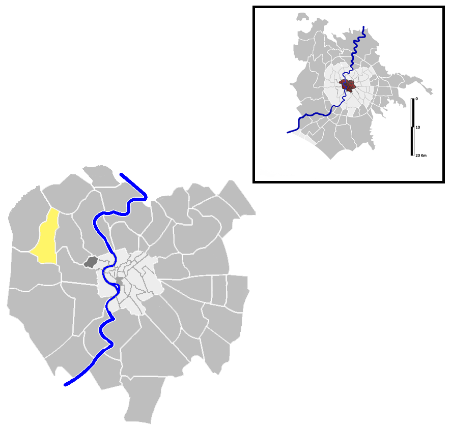 Primavalle